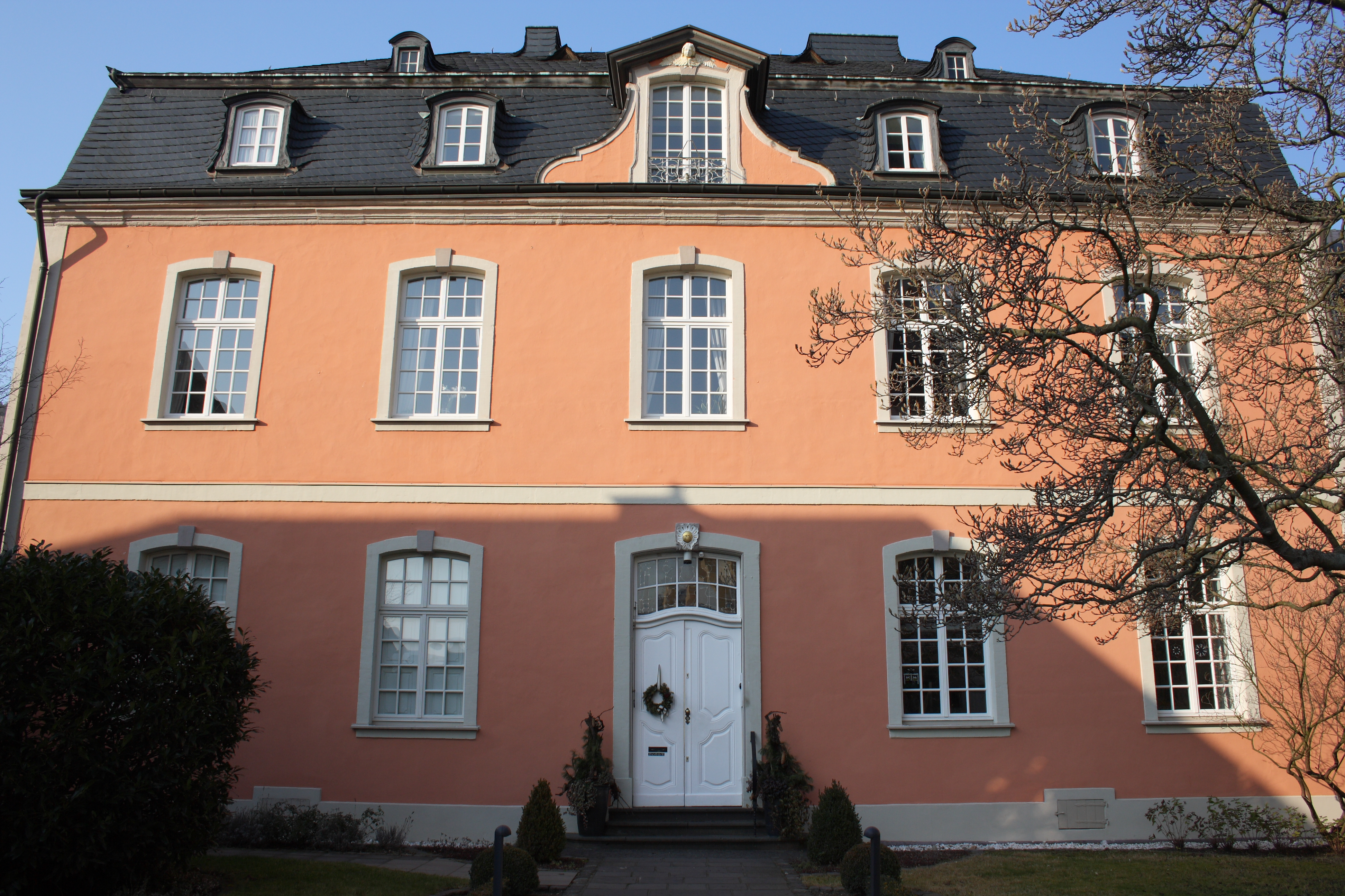 katholisches Pfarrhaus in Ahrweiler, Marktplatz 13